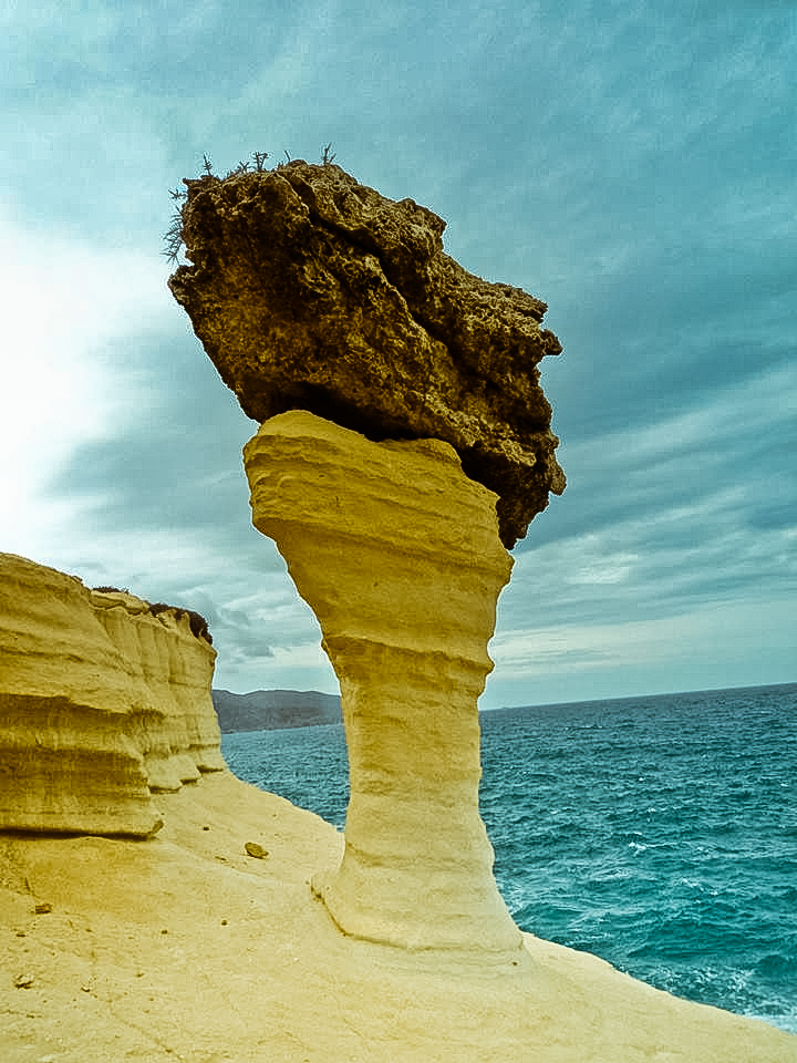 أعماق المغرب